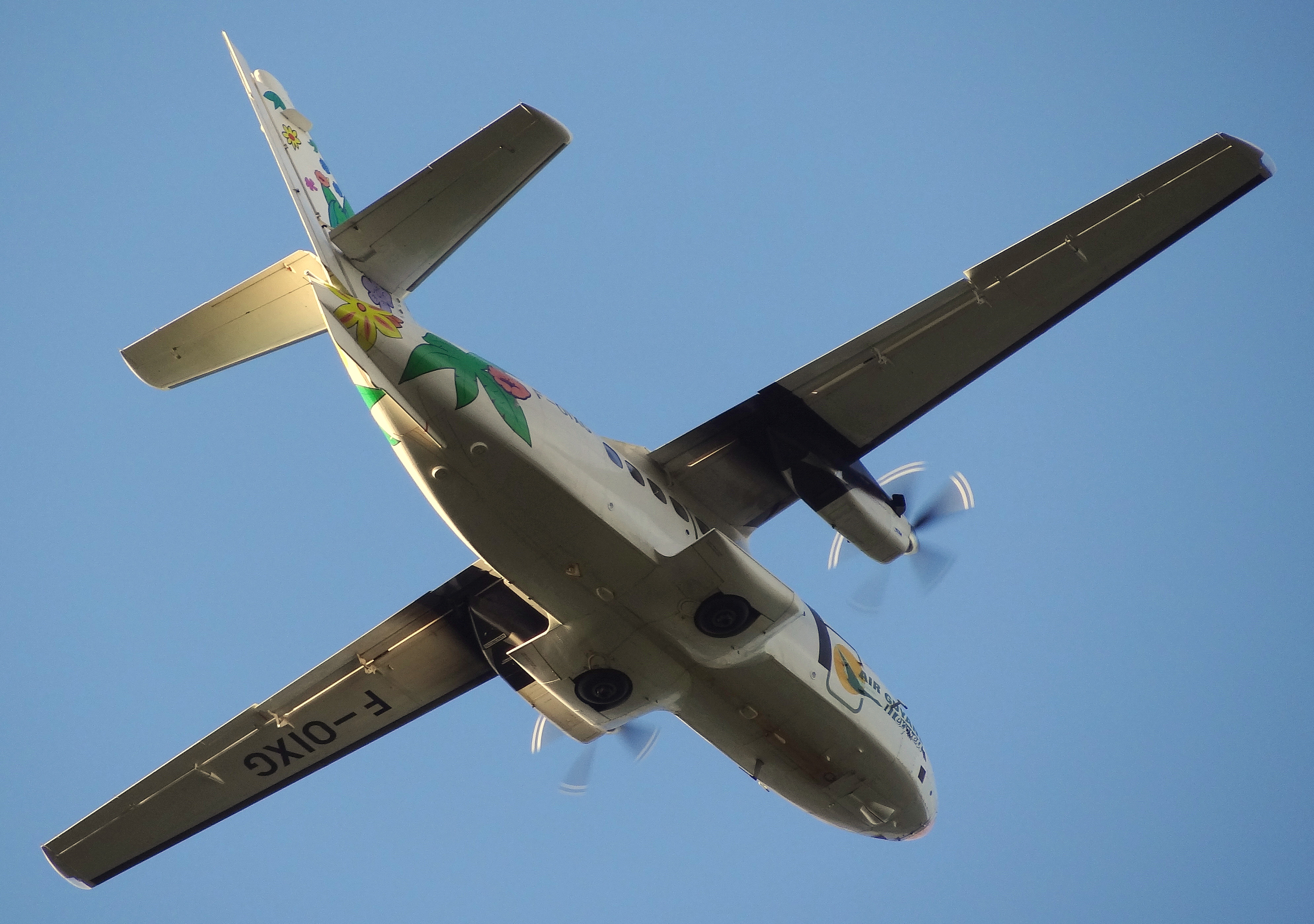 Green Bird [F-OIXG]